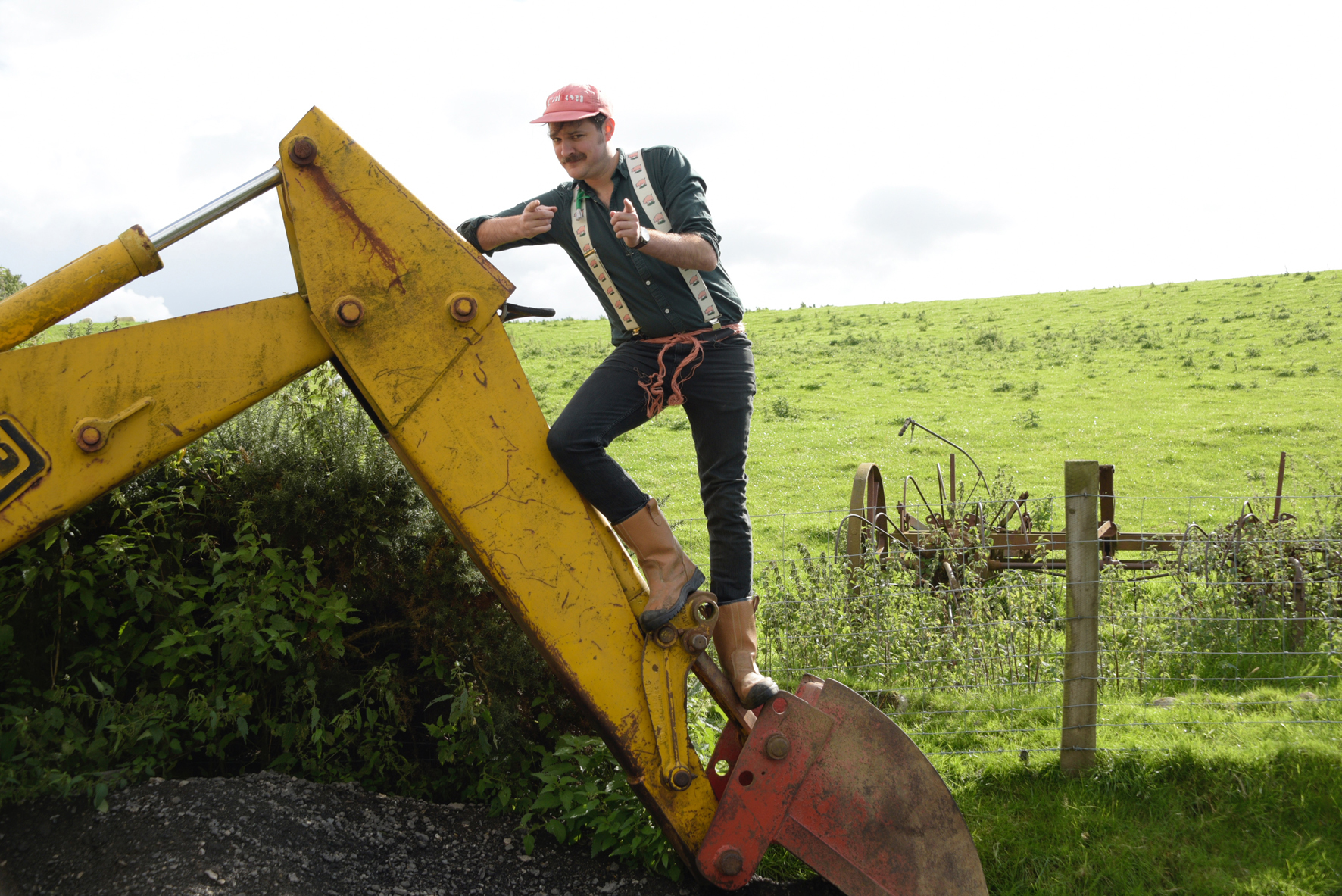 Tynnu lluniau ar gyfer clawr 'Dyn y Diesel Coch'